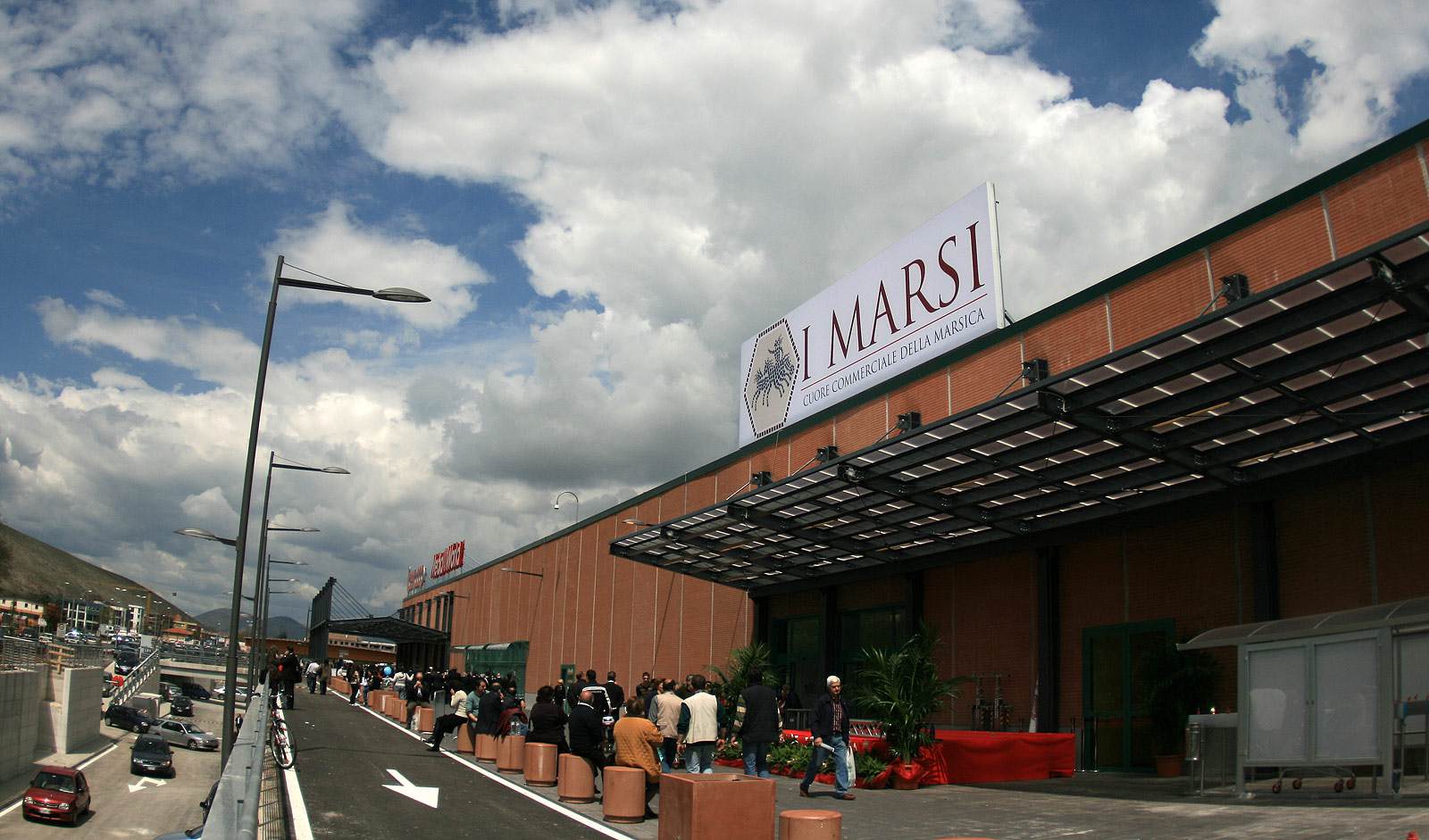 Nel 2008 è iniziato un nuovo impulso allo sviluppo in Abruzzo, con l'apertura di un supermercato a Capistrello e di due supermercati ad Avezzano. Sempre ad Avezzano, il 24 aprile 2008 ha aperto il terzo Ipercoop della Cooperativa, nel centro commerciale "I Marsi"